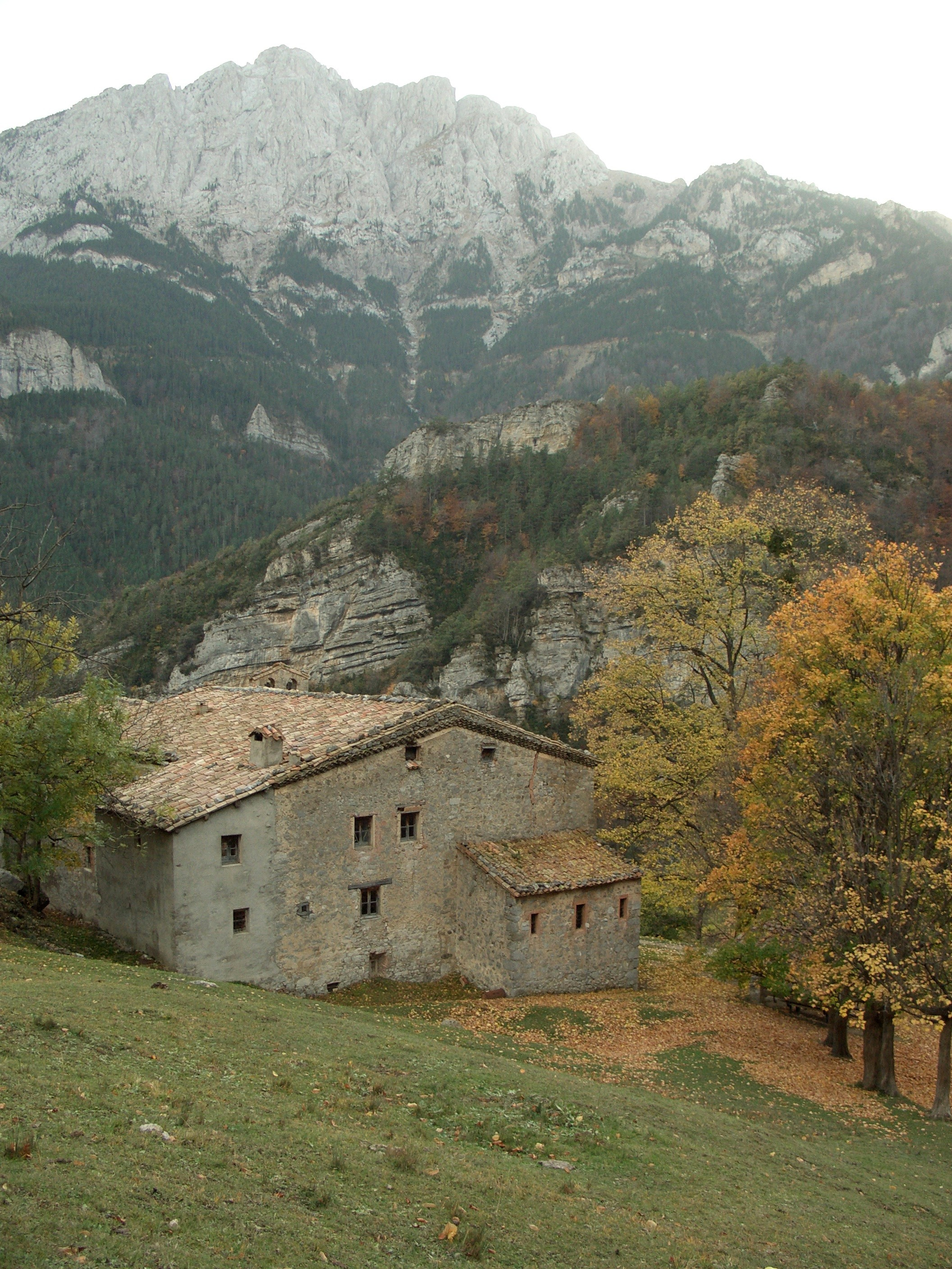 Gresolet, Berguedà, Catalonia